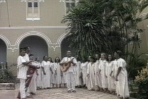 Grupo brasileiro Trovadores do Vale em imagem do acervo da TV Brasil.